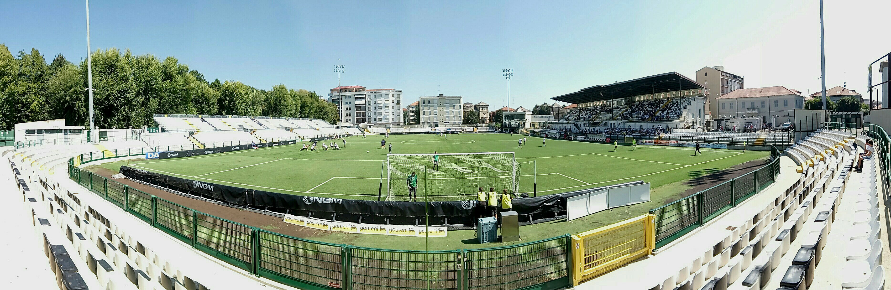 Lo Stadio Silvio Piola di Vercelli visto dalla curva ovest